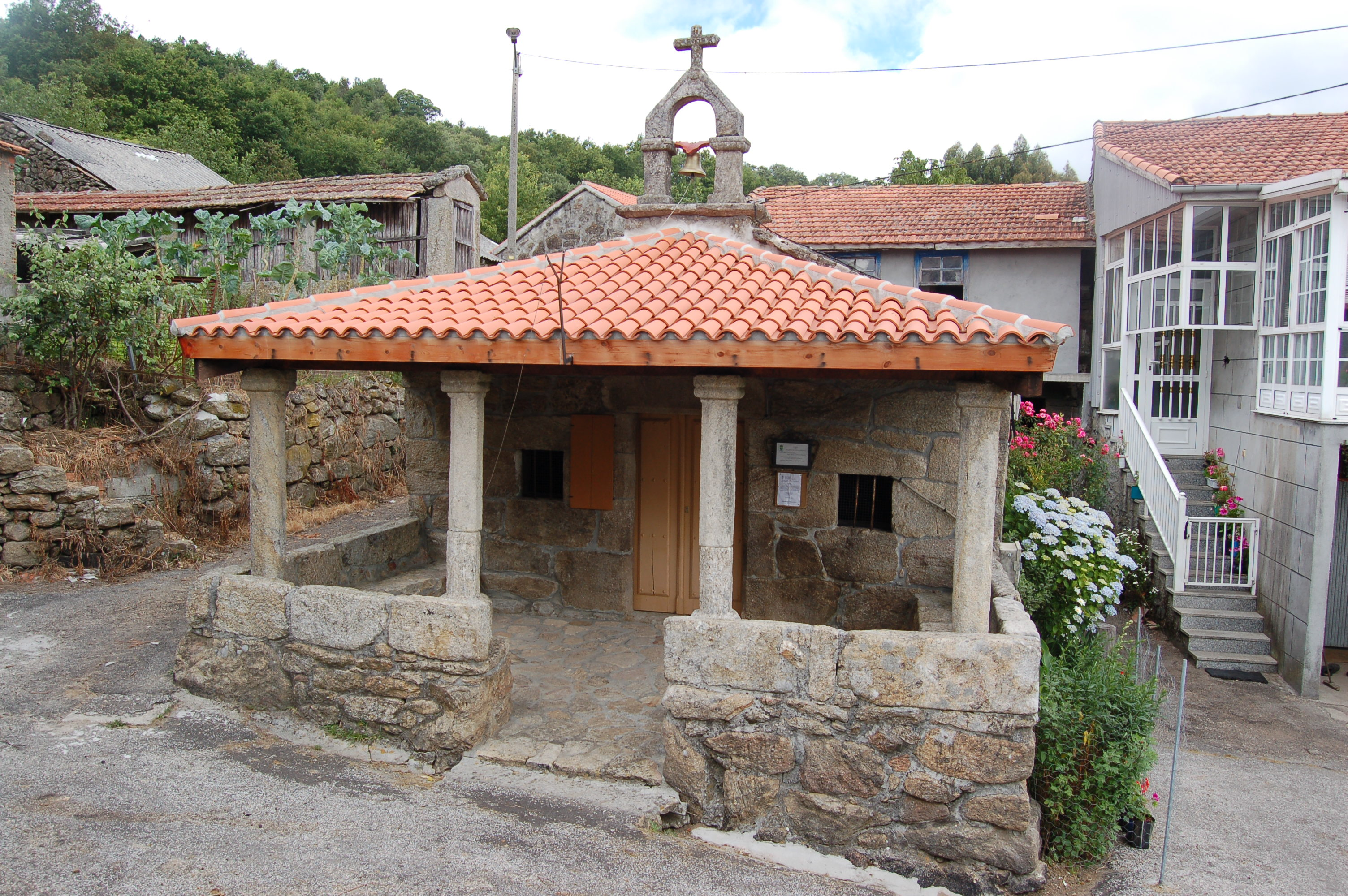 Capela da Nosa Señora da Virxe do Rosario de Vilariño, en Vilariño (Monte Longo, Lobeira)